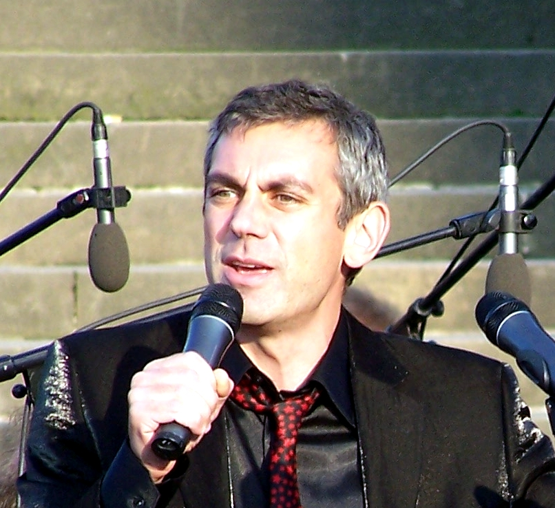 Wladimir Kaminer als Moderator des Freiluftkonzerts "Dresden singt und musiziert" im Rahmen der Dresdner Musikfestspiele